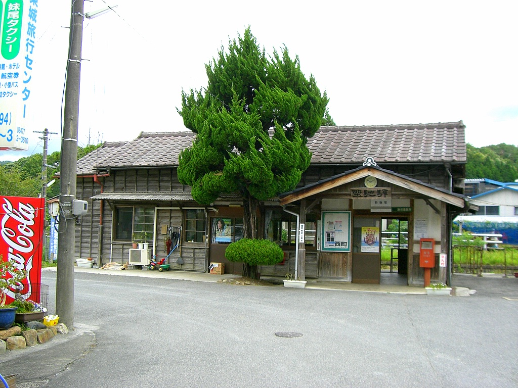 JR芸備線、野馳駅の駅舎。 投稿者が撮影。2006年7月29日